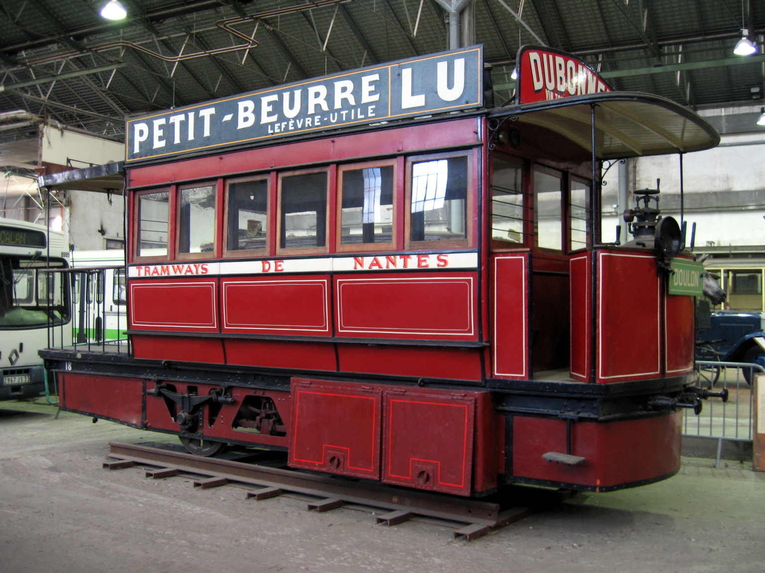 Tramway historique de Nantes à l'AMTUIR 15/09/2007.